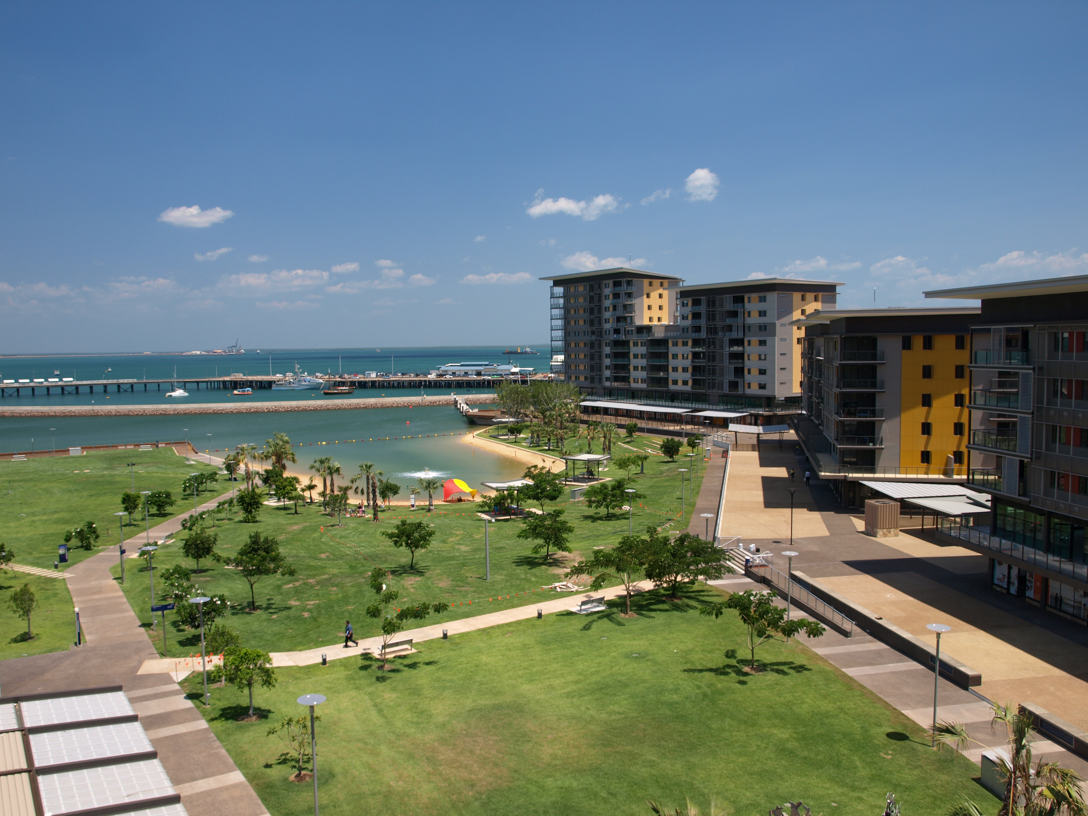 Darwin